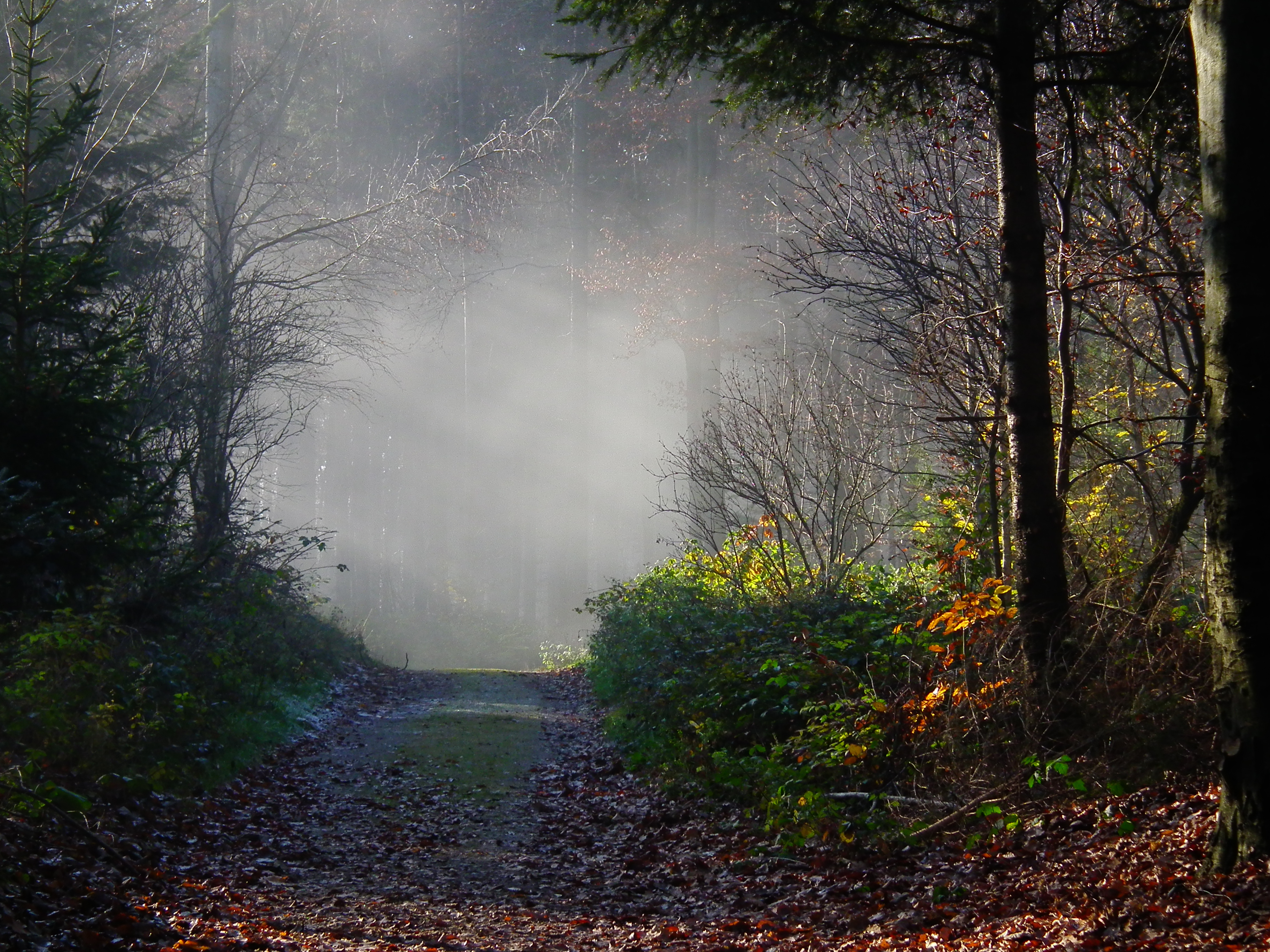 Waldweg auf der Tromm (Hessen, Deutschland)